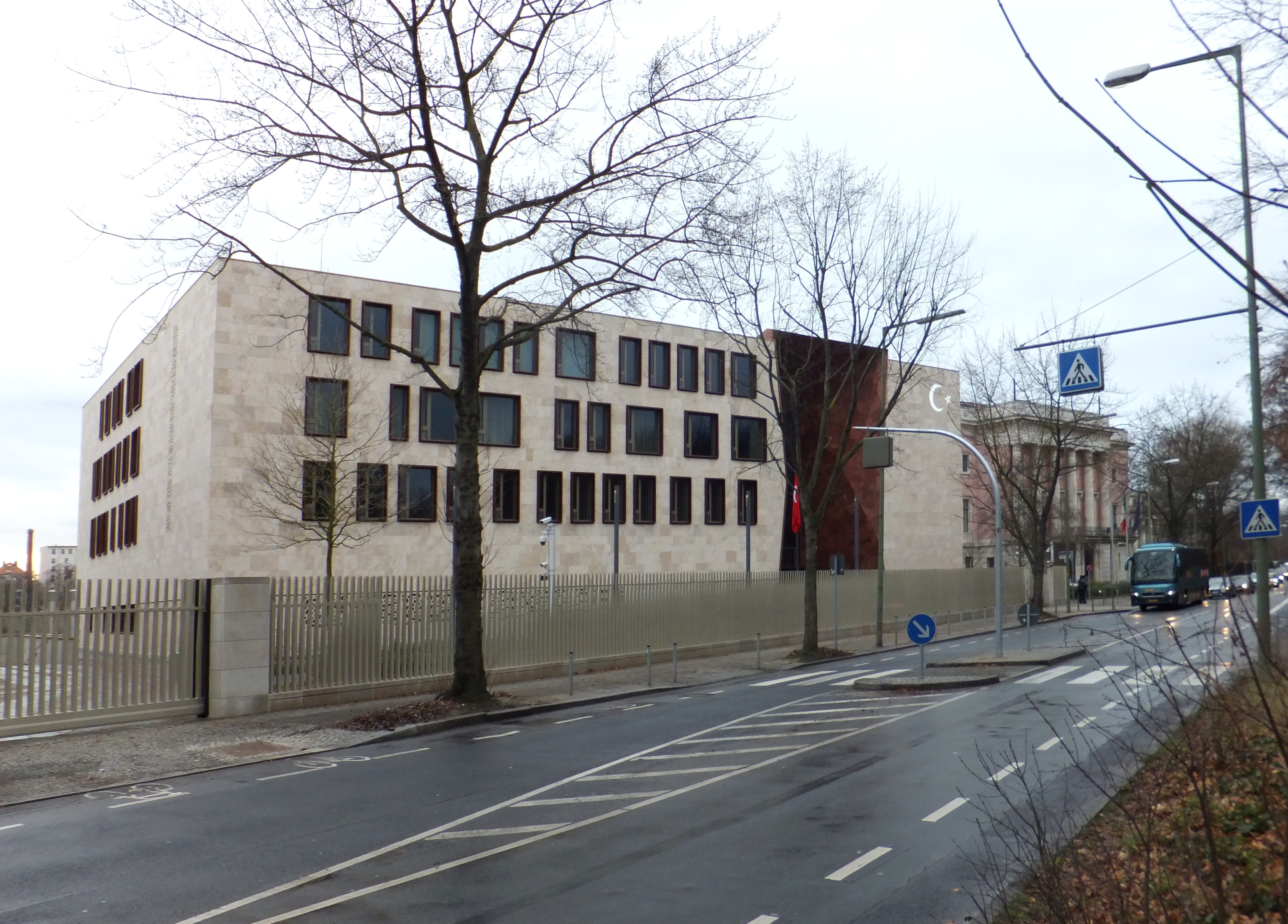 Gebäude der Türkischen Botschaft